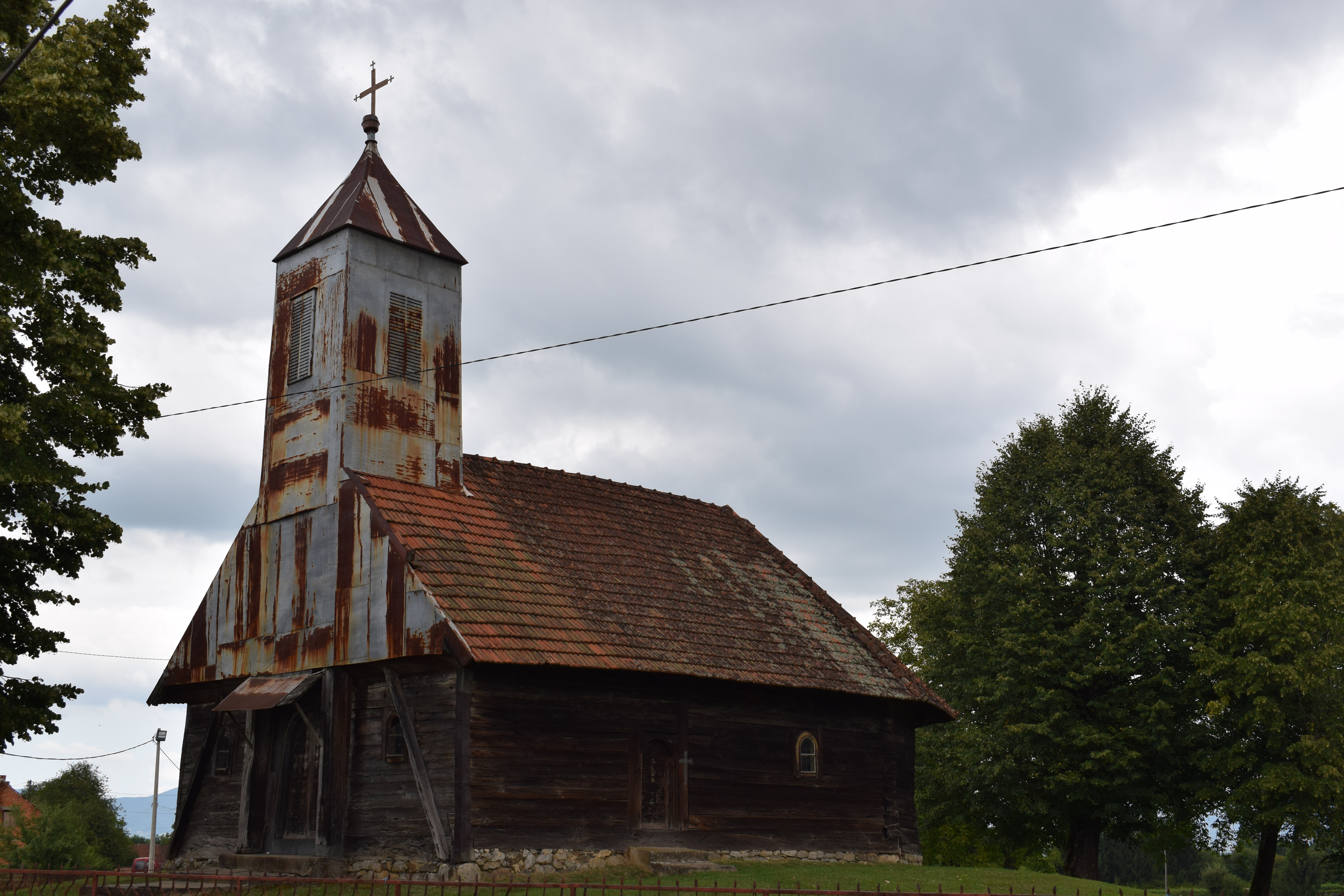 Црква Вазнесења Господа Исуса Христа у Ракелићима изграђена је на мјесту које се некад звало Збориште. Прије ње на овом мјесту била је мања црква-чарда са околним гробљем, срушена у првој половини 19. вијека. Црква је, након дуго година градње изграђена и освештана 1856. године, а посвећена је Светом Вазнесењу Господњем. Саградили су је мајстори из Приједора, о чему говори урезана година 1856. и инцијали М.Ч. на средњим брвнима. Данашња црква брвнара, за разлику од првобитне из средине 19. вијека, има темељни зид висок око пола метра. Постоје два улаза у цркву, један на јужној, а други, главни, на западној страни. Иконостас је из времена подизања цркве са иконома које су радили мастори из Костајнице. У цркви се налази неколико црквених реликвија из Јерусалима међу којима се истиче Јерусалимска икона. Поред старе цркве брвнаре у Ракелићима је 1986. године подигнута нова црква посвећена Светој Тројици.